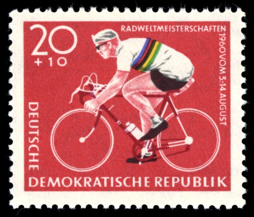 Information Information: Ausgabepreis: Pfennig First Day of Issue / Erstausgabetag: Auflage: Entwurf: Druckverfahren: Michel-Katalog-Nr: Ländercode-MiNr